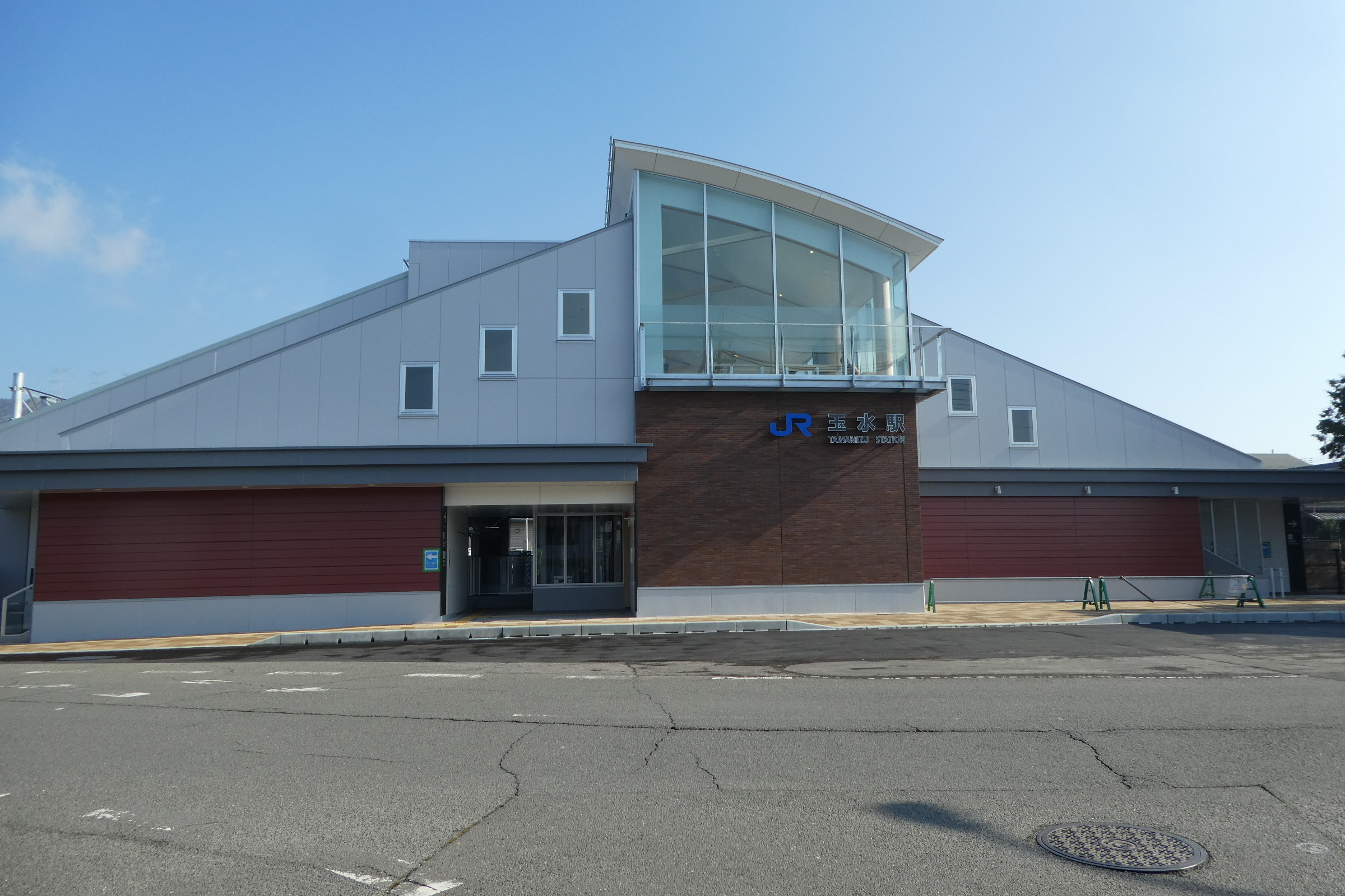 奈良線玉水駅